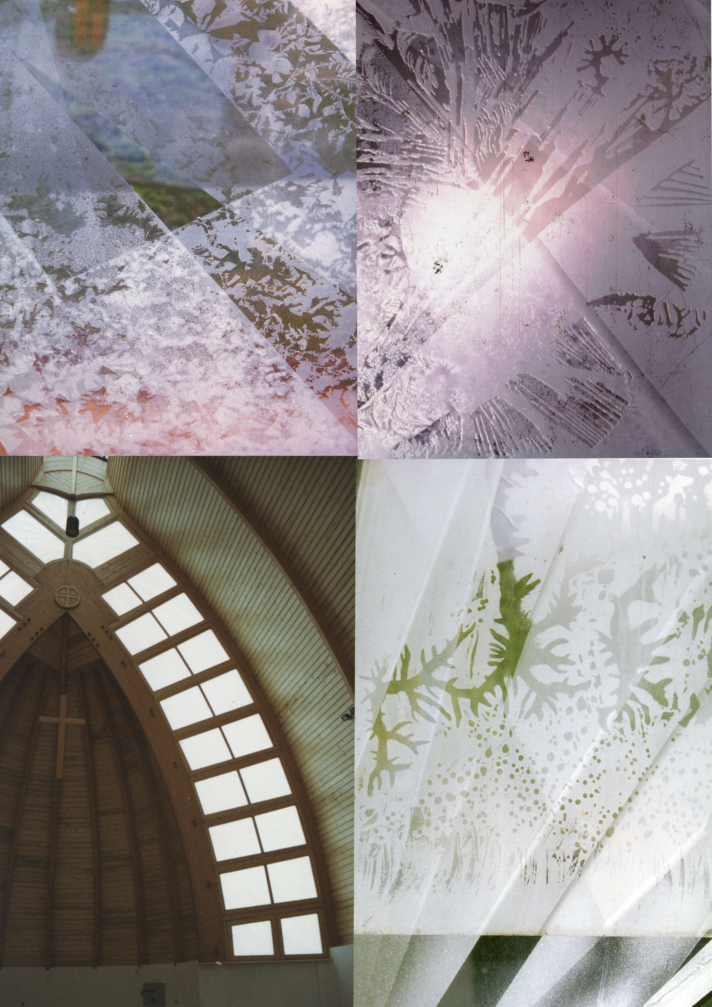 A kozármislenyi Ferences Betegápoló Nővérek templomának diadalíve, valamint részletfotók.